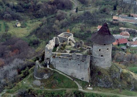 Somoskő látképe Szlovákia felől. Somoskő vára. Somoskő romjai. A Somoskői vár látképe Szlovákia felöl.